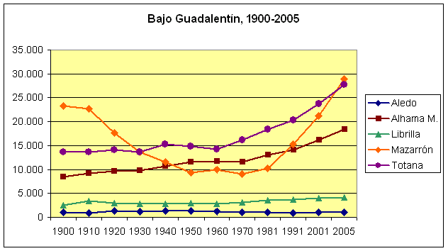 Población de los cinco municipios, (1900-2005). En naranja, Mazarrón, el caso más singular. The population of the municipalities of the Bajo Guadalentín region, Murcia, Spain, (1900-2005). Aledo, Alhama de Murcia, Librilla, Mazarrón and Totana. Own work, given to PD. Source: Instituto Nacional de Estadística.